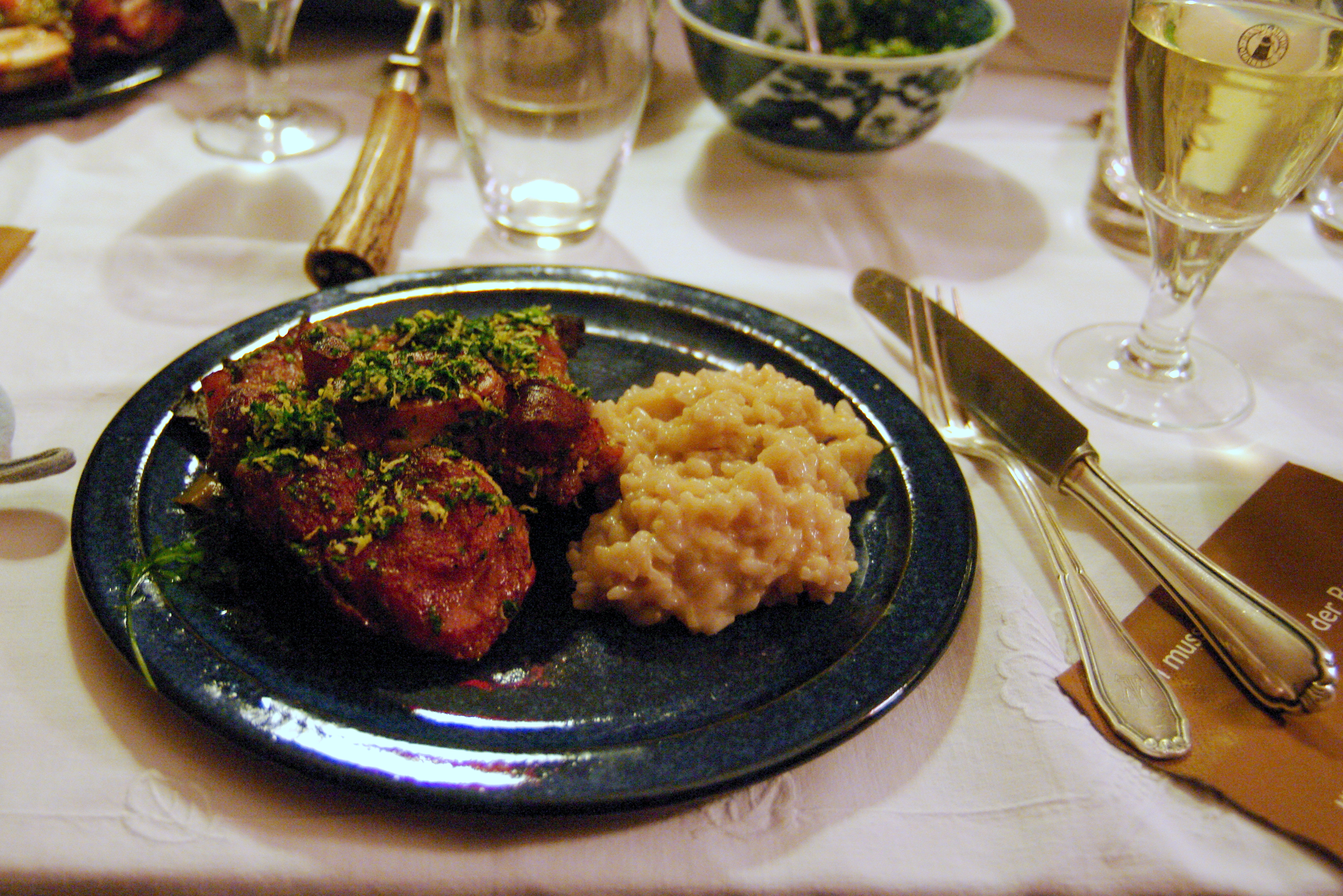 Redaktionsvortreffen Essen und Trinken 2. Ossobuco.